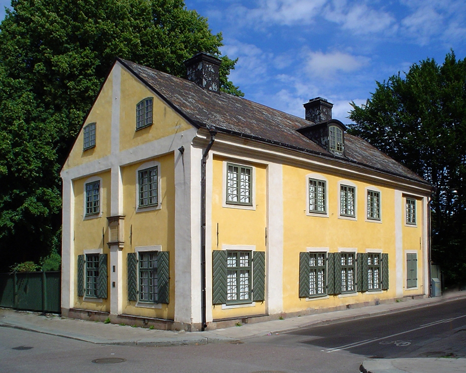 Linnés House in Uppsala